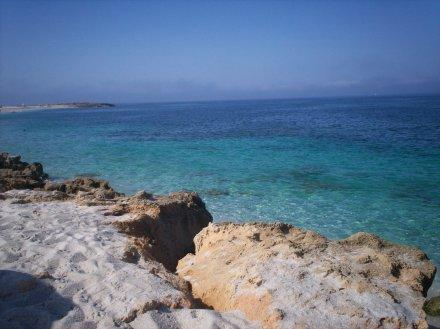 spiaggia di is arutas cabras